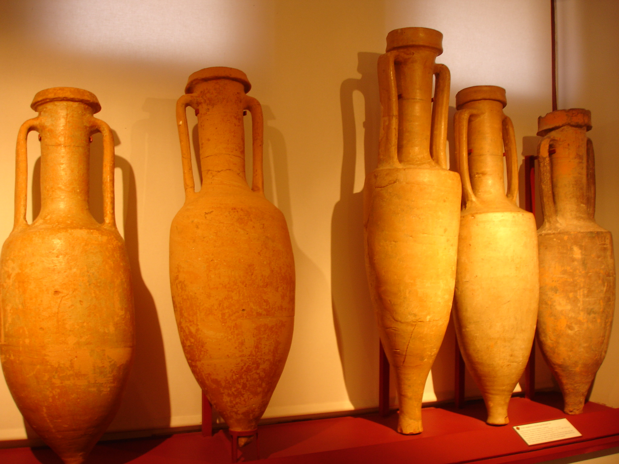 France, Toulouse, Musée Saint-Raymond, àdroite trois amphores de type Dressel 1B trouvés dans un puit funéraire à Vieille-Toulouse datant de la fin du IIe siècle avant J.C. et deux amphores de type Dressel 1A